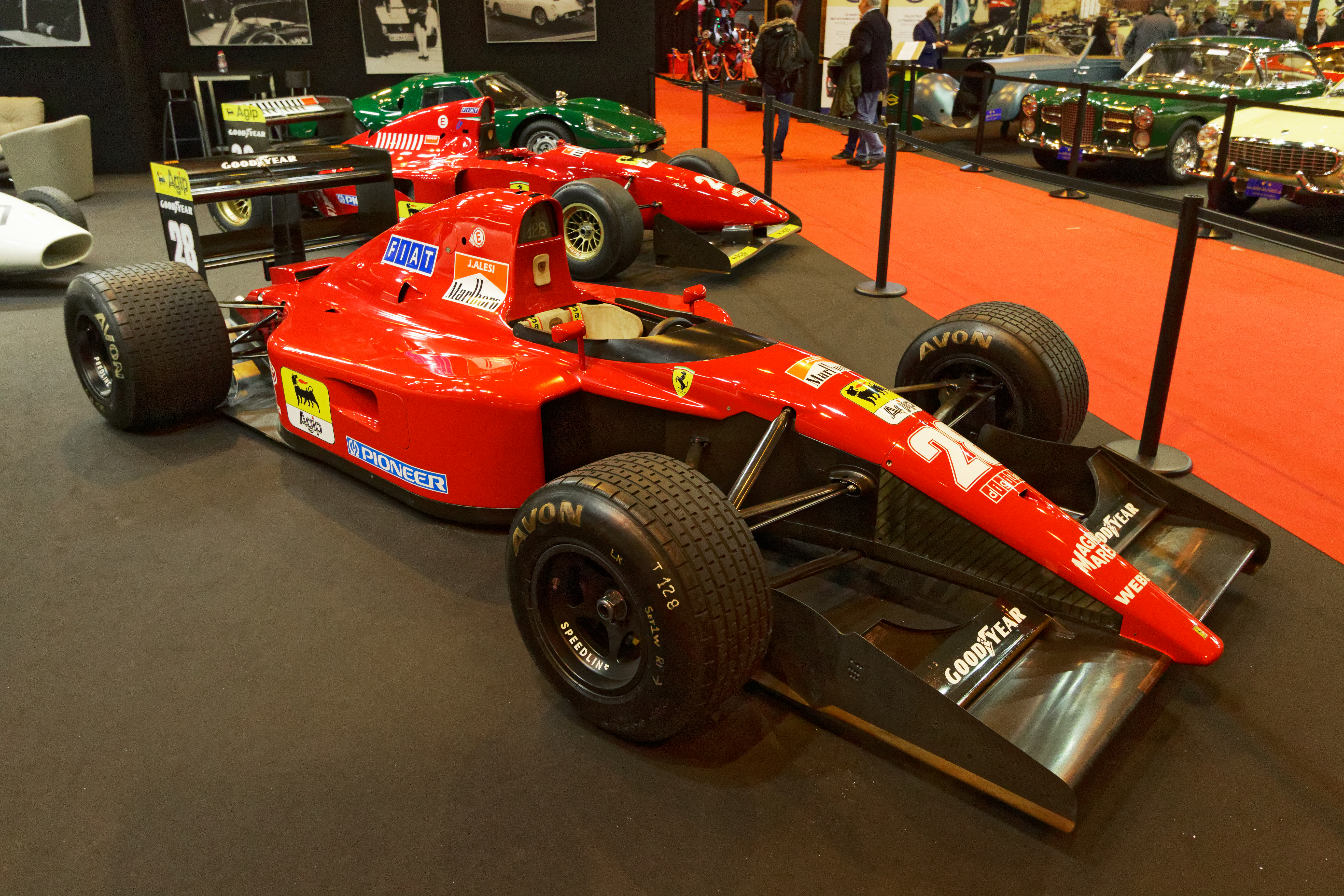 La Ferrari 643 pilotée par Jean Alesi en 1991 exposée lors du salon Rétromobile 2018.